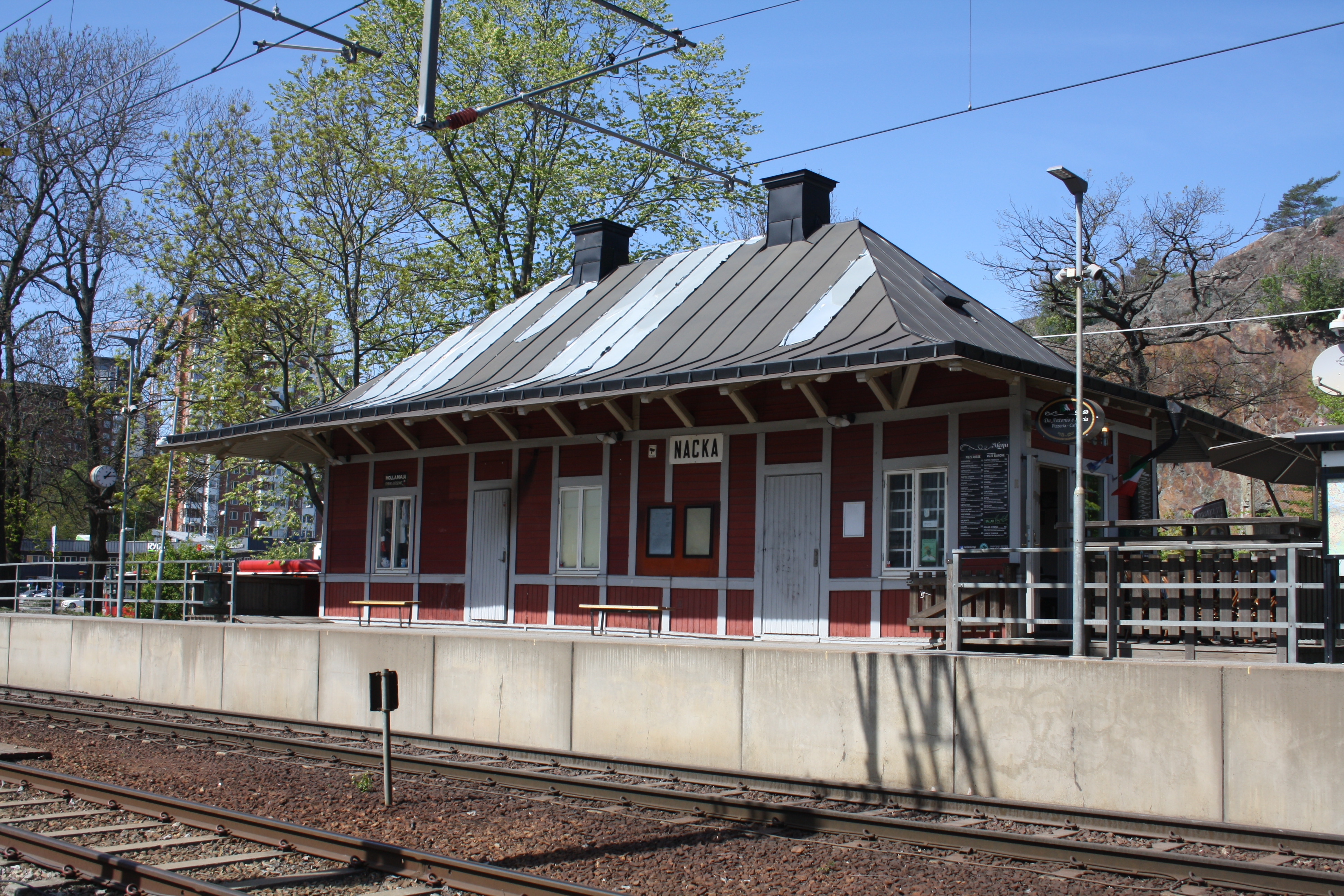 Nacka station